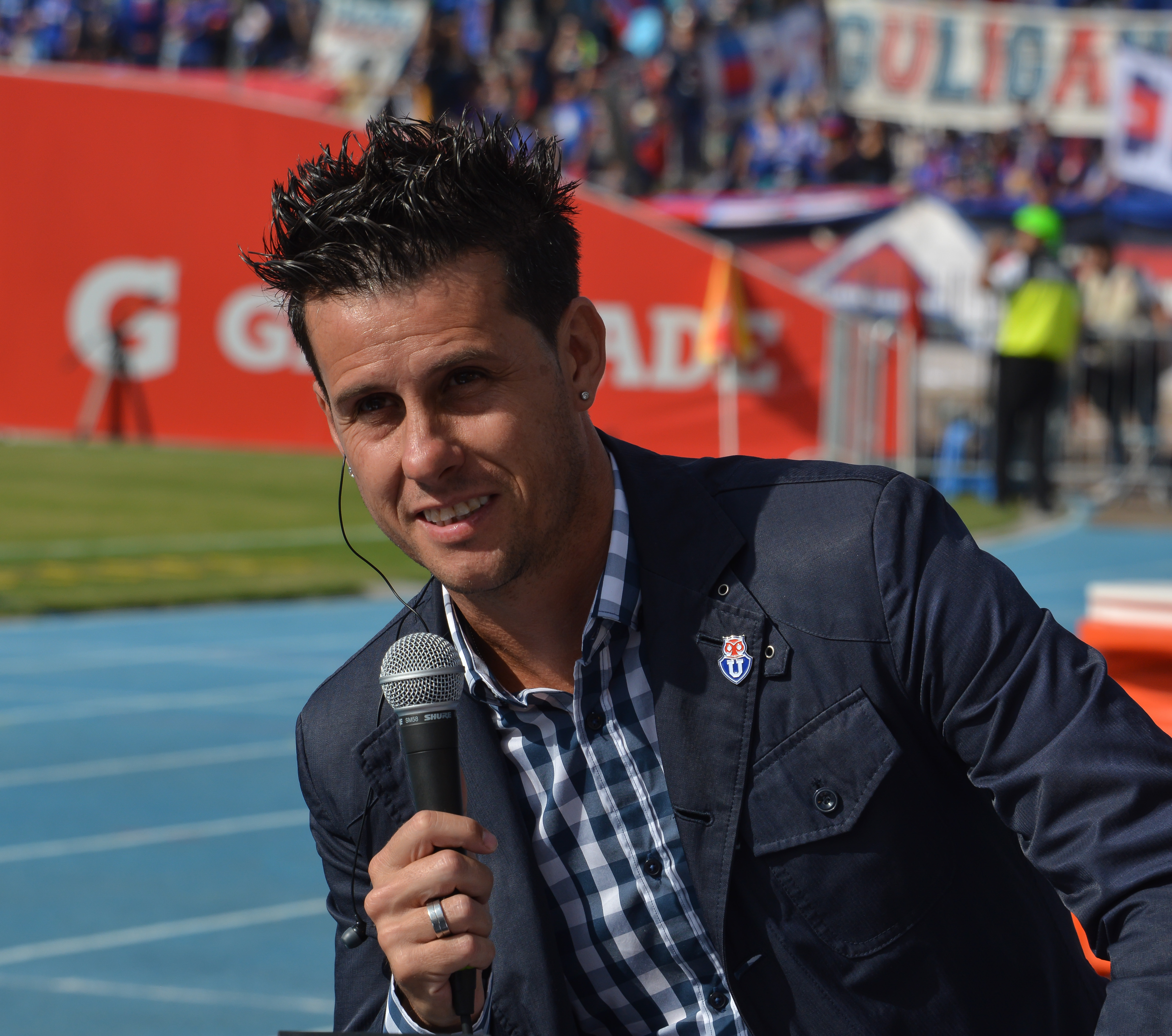 Diego Rivarola, Universidad de Chile v Colo-Colo, Estadio Nacional, Santiago, Chile.